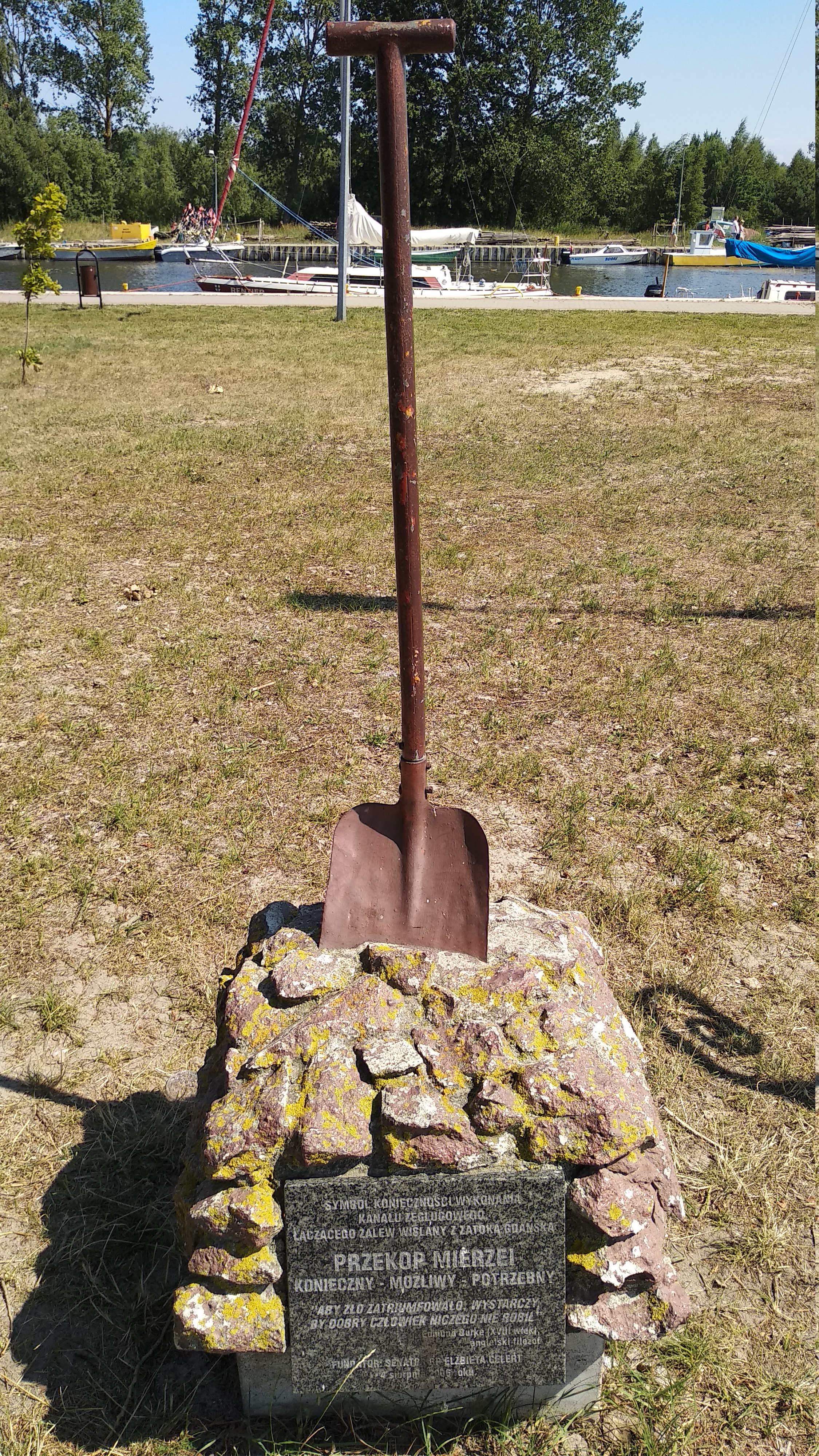 Pomnik konieczności przekopu Mierzei Wiślanej na terenie portu w Kątach Rybackich.